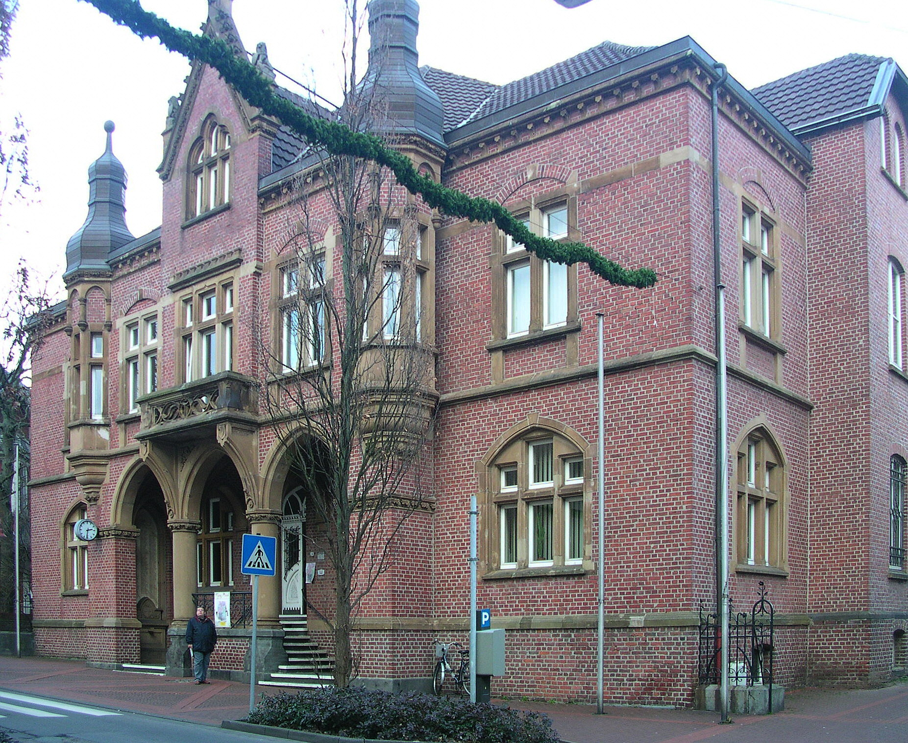 Würselen, Rathaus